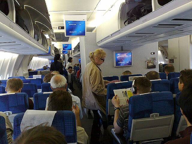 Jumbo jet